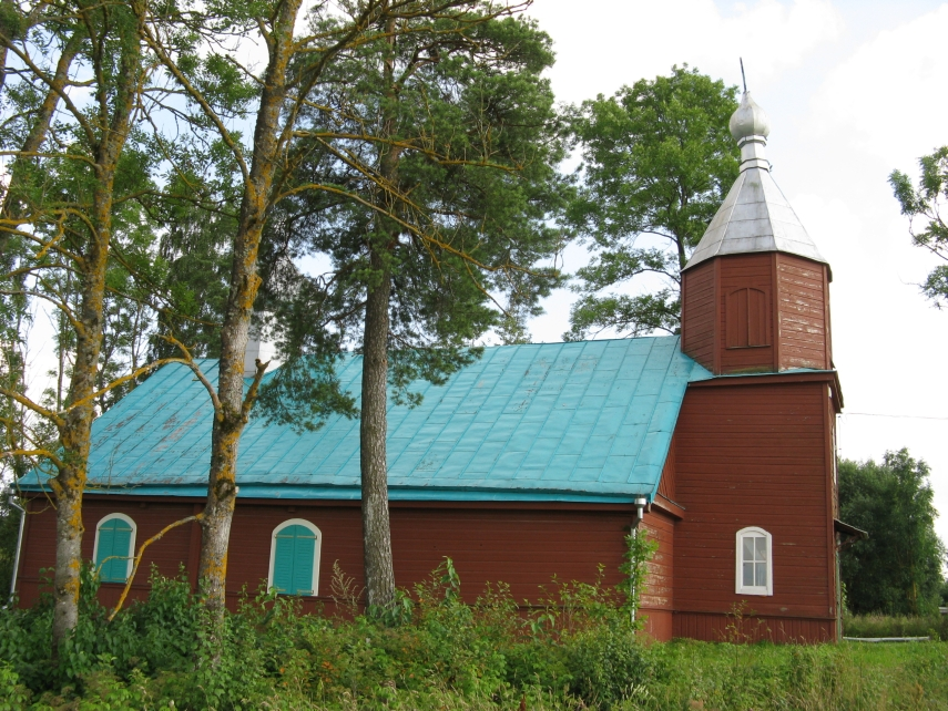 Žalvariai